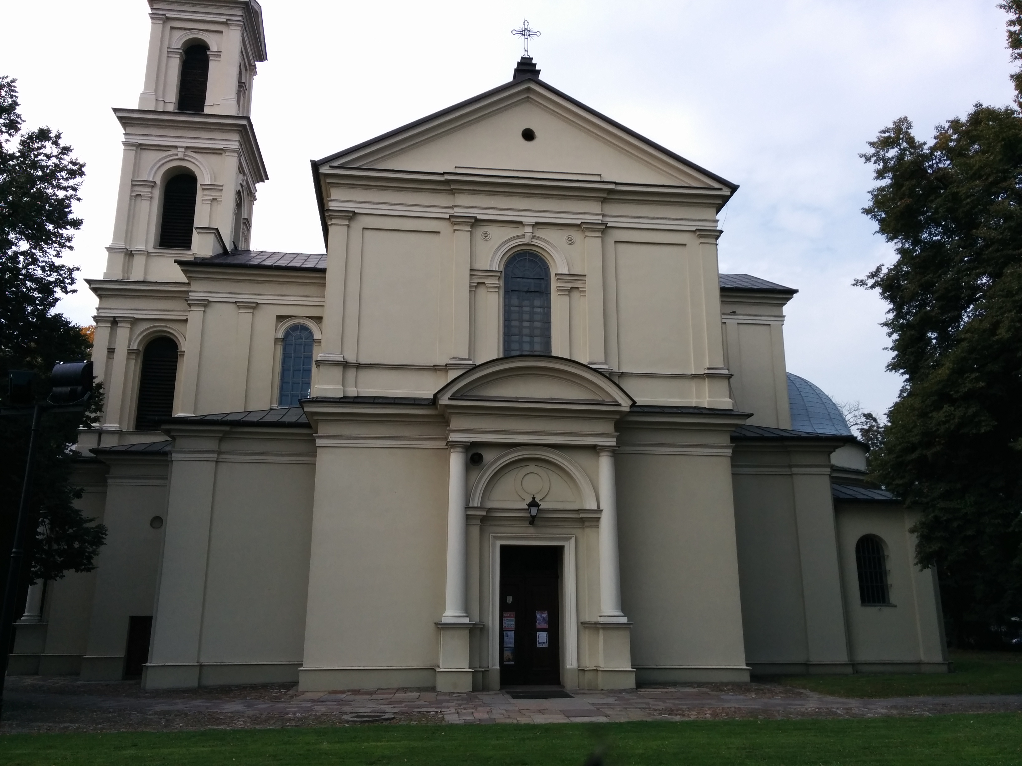 Kielce, zespół kościoła par. pw. św. Wojciecha